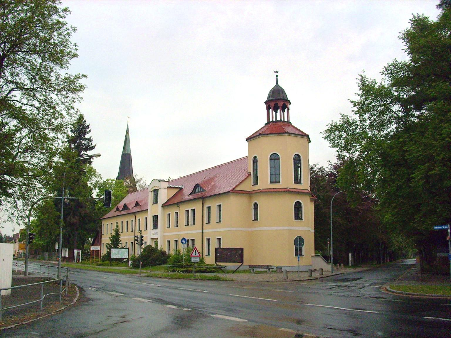 Stadtbibliothek, Dresdener Straße 2 in Bernsdorf (Oberlausitz)